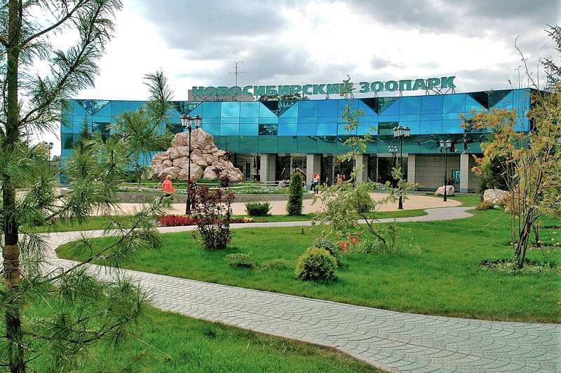 Новосибирский зоопарк